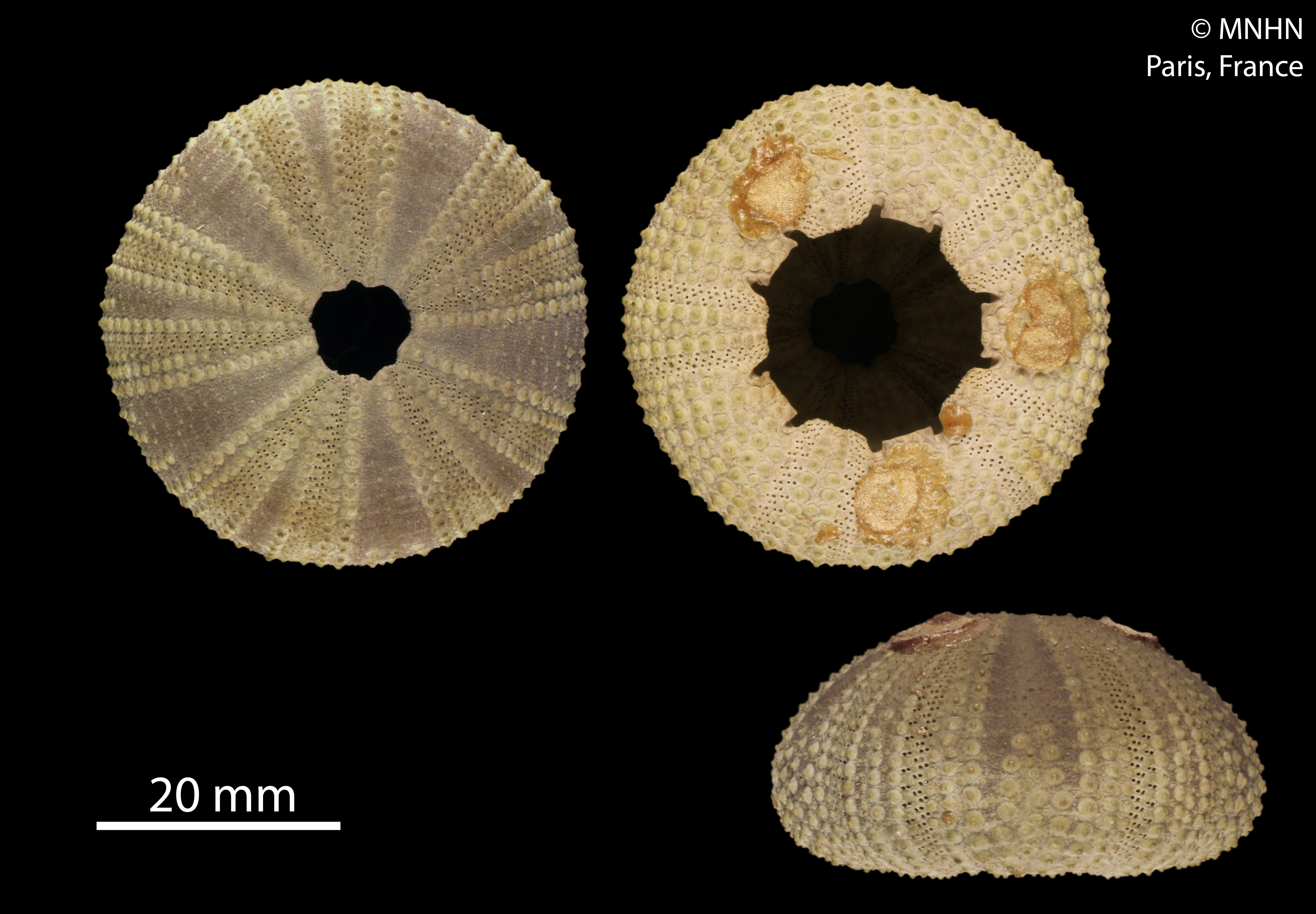 Lytechinus semituberculatus, collection du Muséum National d'Histoire Naturelle (Paris, France). Origine : Îles Galápagos